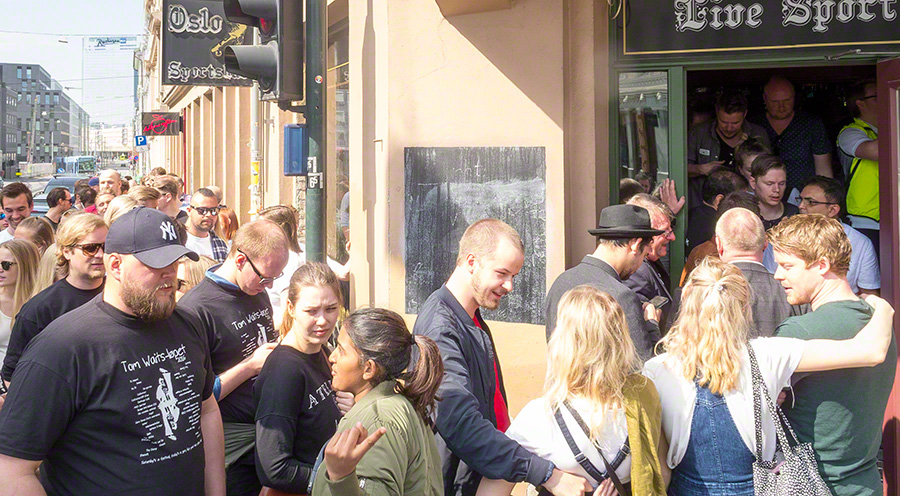 Deltakere under Tom Waits-løpet 2016.